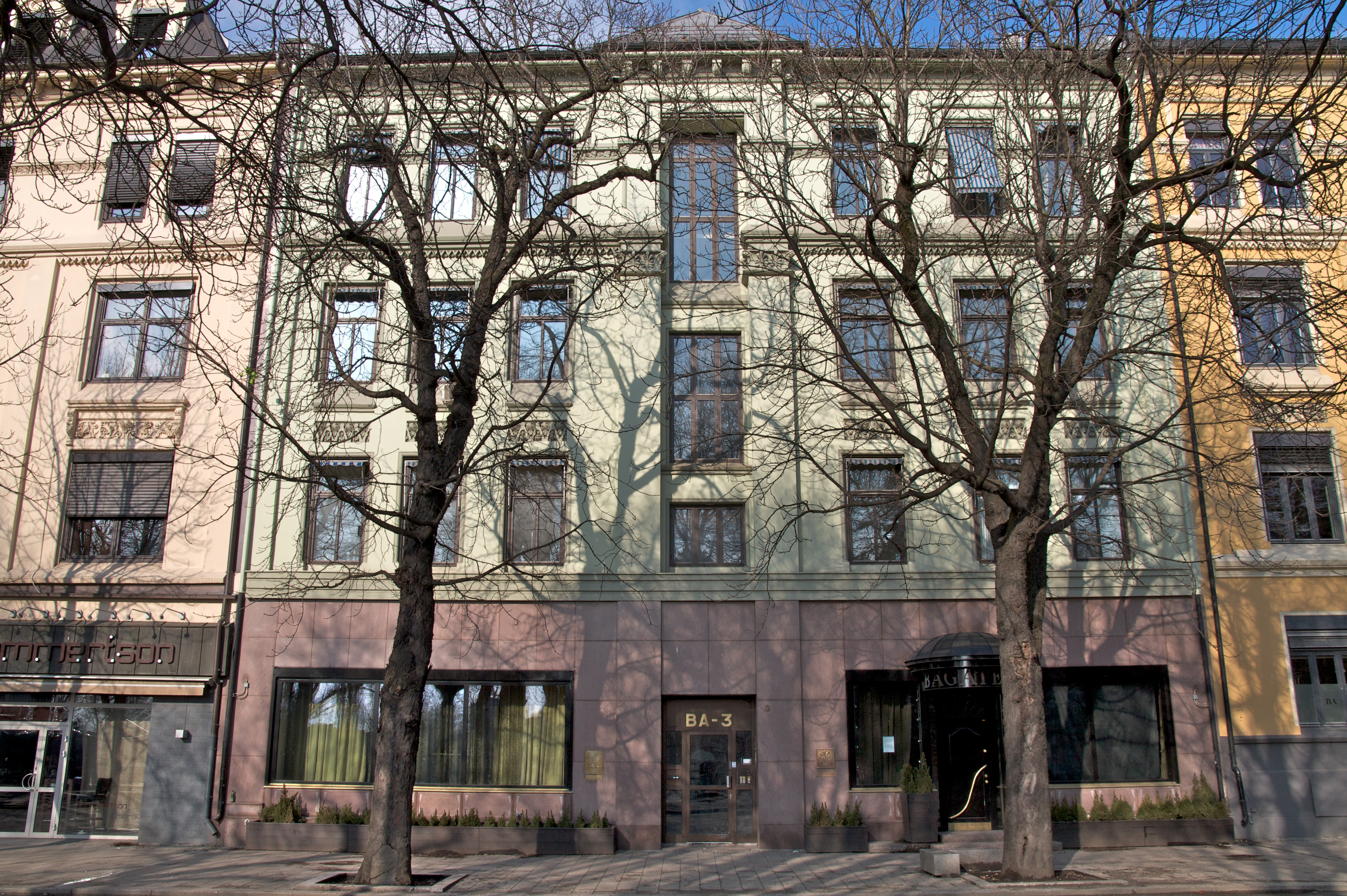 Bygdøy allé 3. Frogner i Oslo.